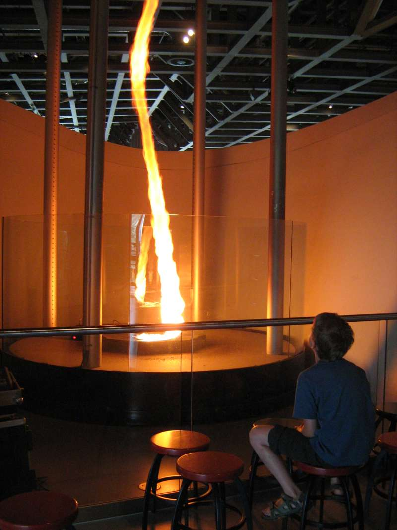 Tornado-Experiment om Phaeno, Wolfsburg, Niedersachsen, D